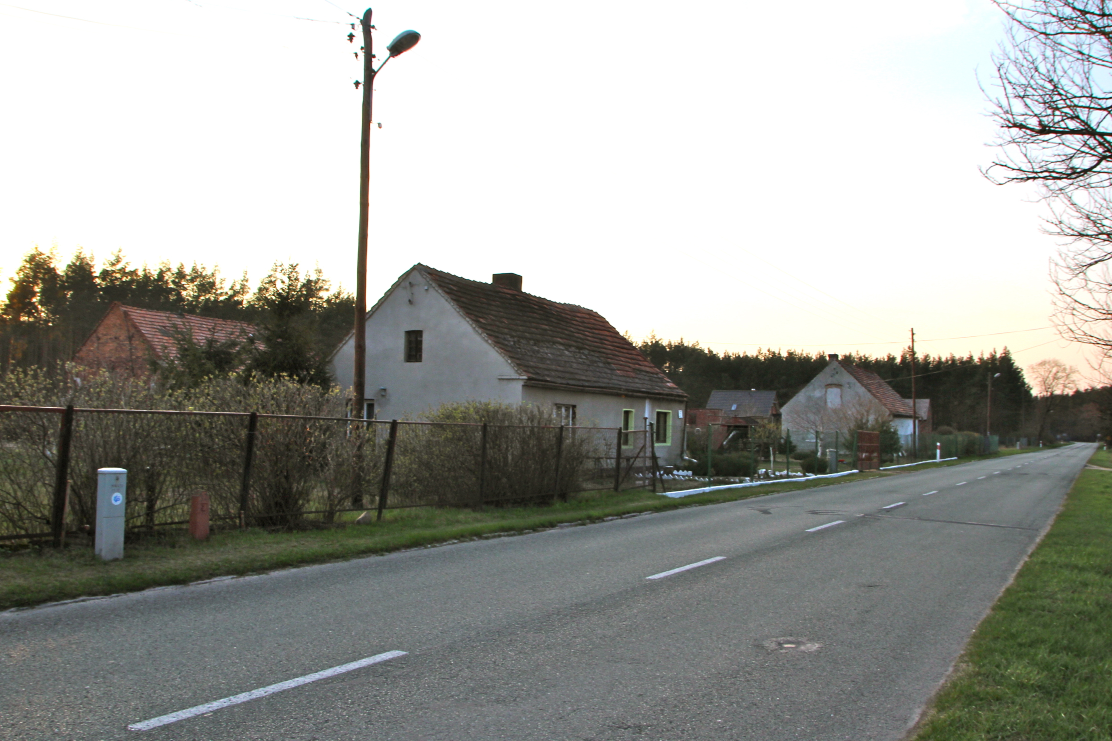 Wodnica – wieś w Polsce w województwie dolnośląskim, w powiecie wołowski, w gminie Wołów.